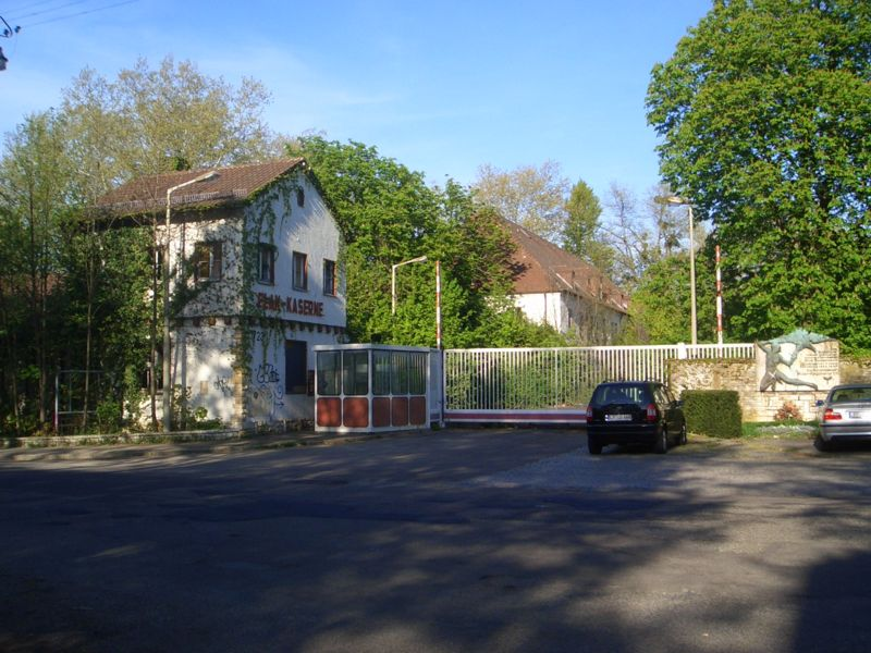 Haupteingang der Flak-Kaserne Ludwigsburg.